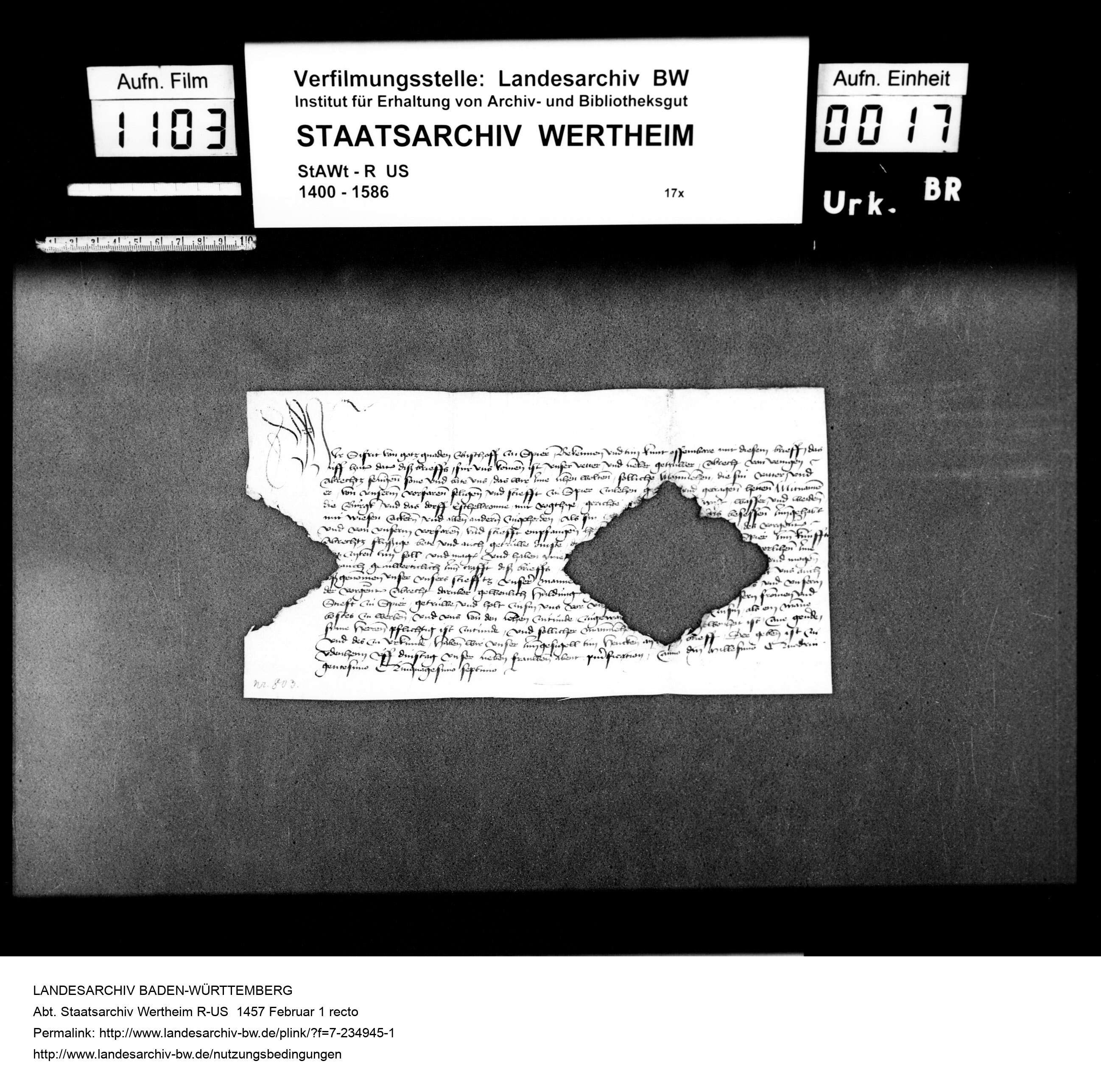 Bischof Sifrit von Speyer (Spier) belehnt den Albrecht von Venningen, Albrechts Sohn, mit Burg und Dorf Eschelbronn und allen Zugehörungen. Besonderheiten: Original, Pergament. Das Siegel des Ausstellers ist abgefallen. Die Urkunde ist stark zerfressen.